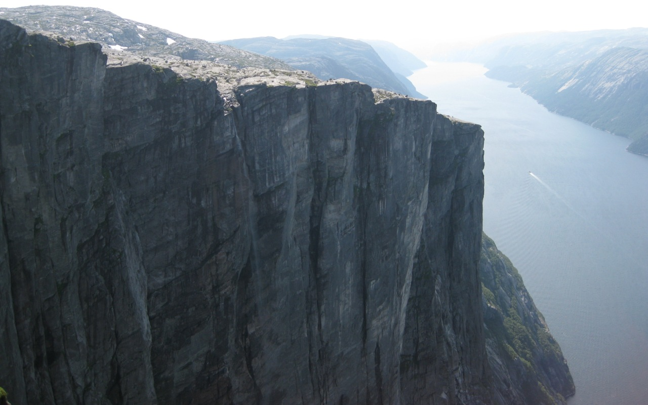 Kjerag og Kjeragsfossen ved Lysefjorden. Vassføringa i fossen er så lita at han vert oppløyst i fallet.